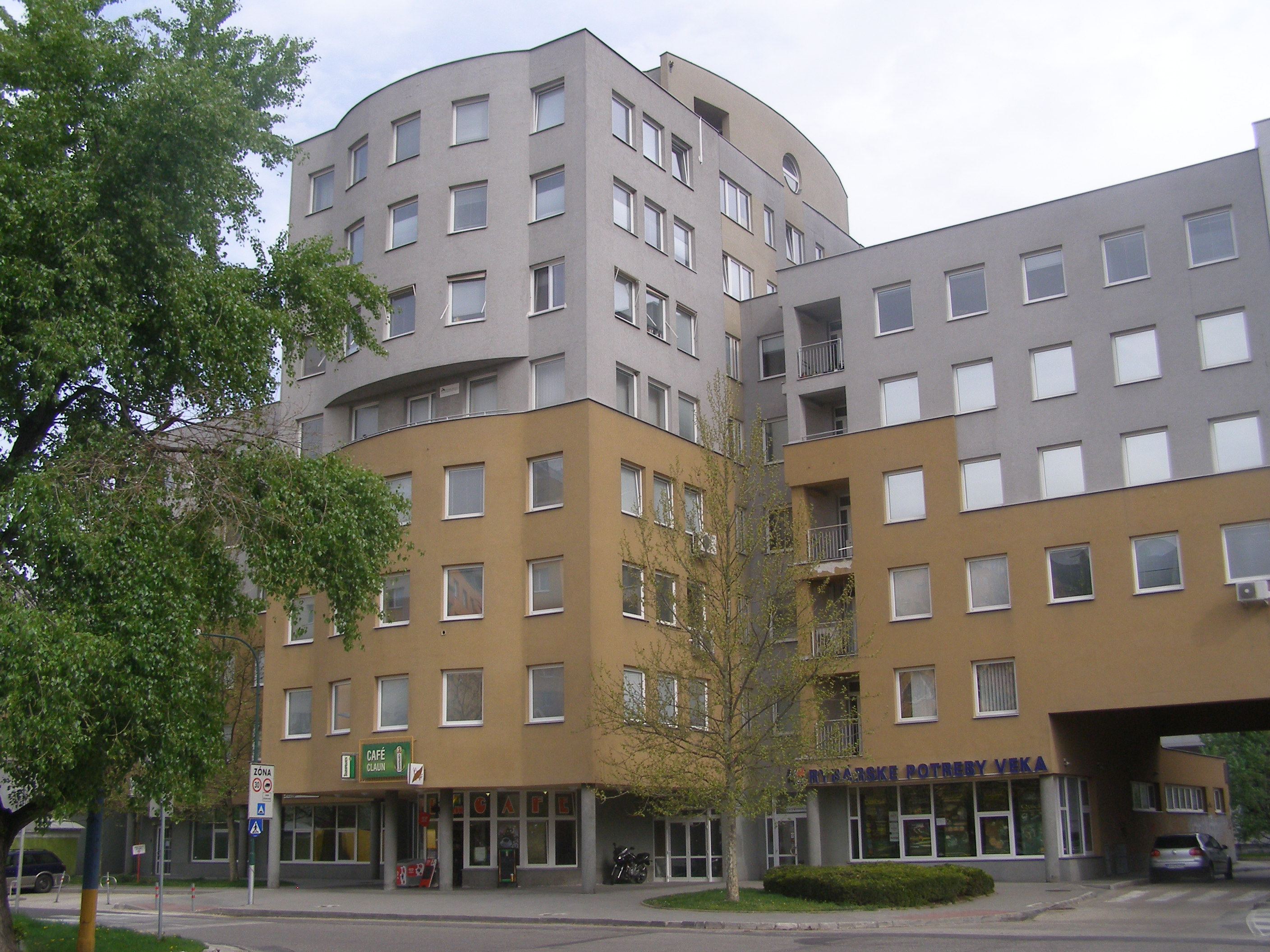 Černyševského street, Petržalka, Bratislava